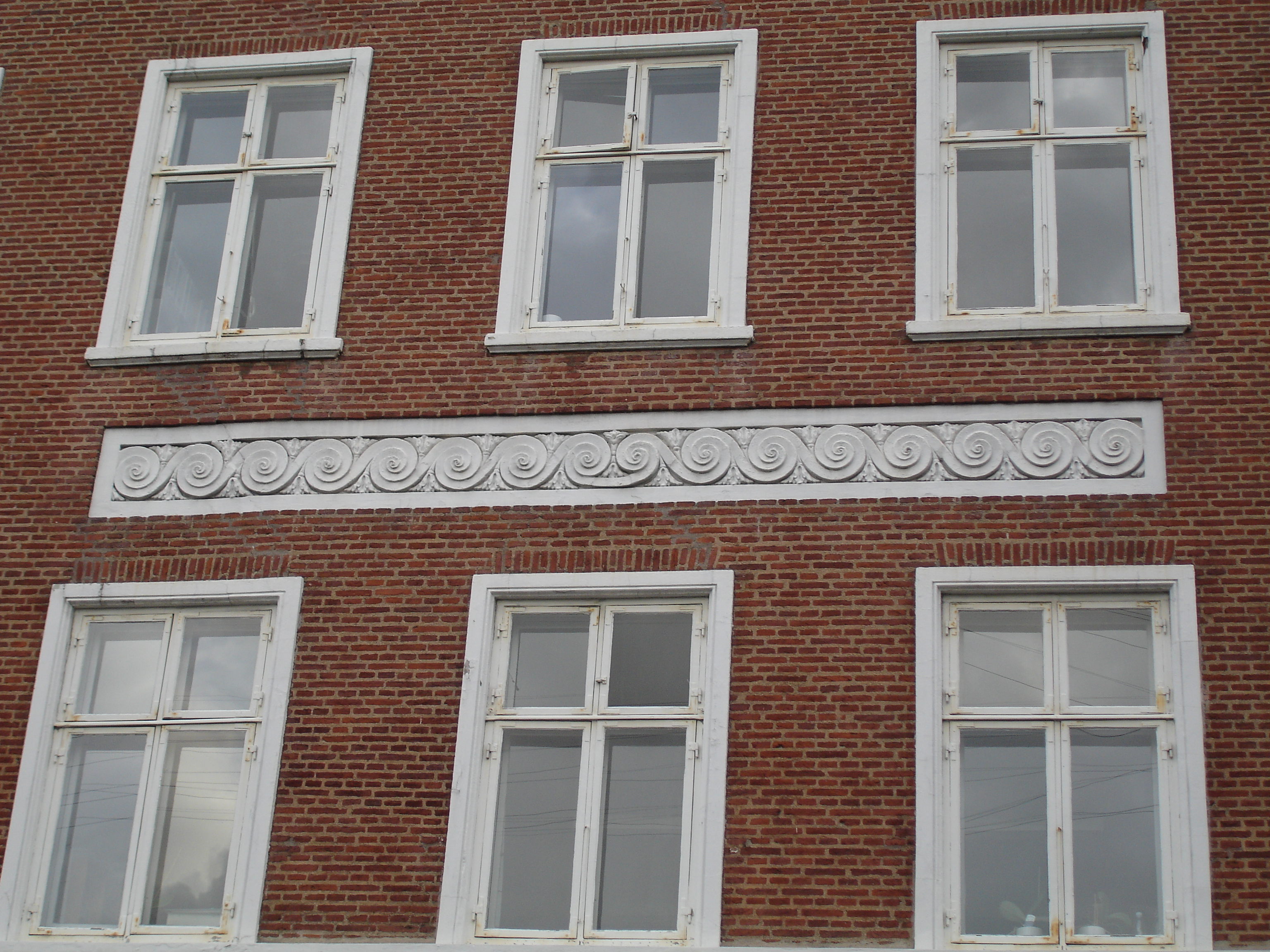 Kronprinsessegade 14, Copenhaga, Dinamarca